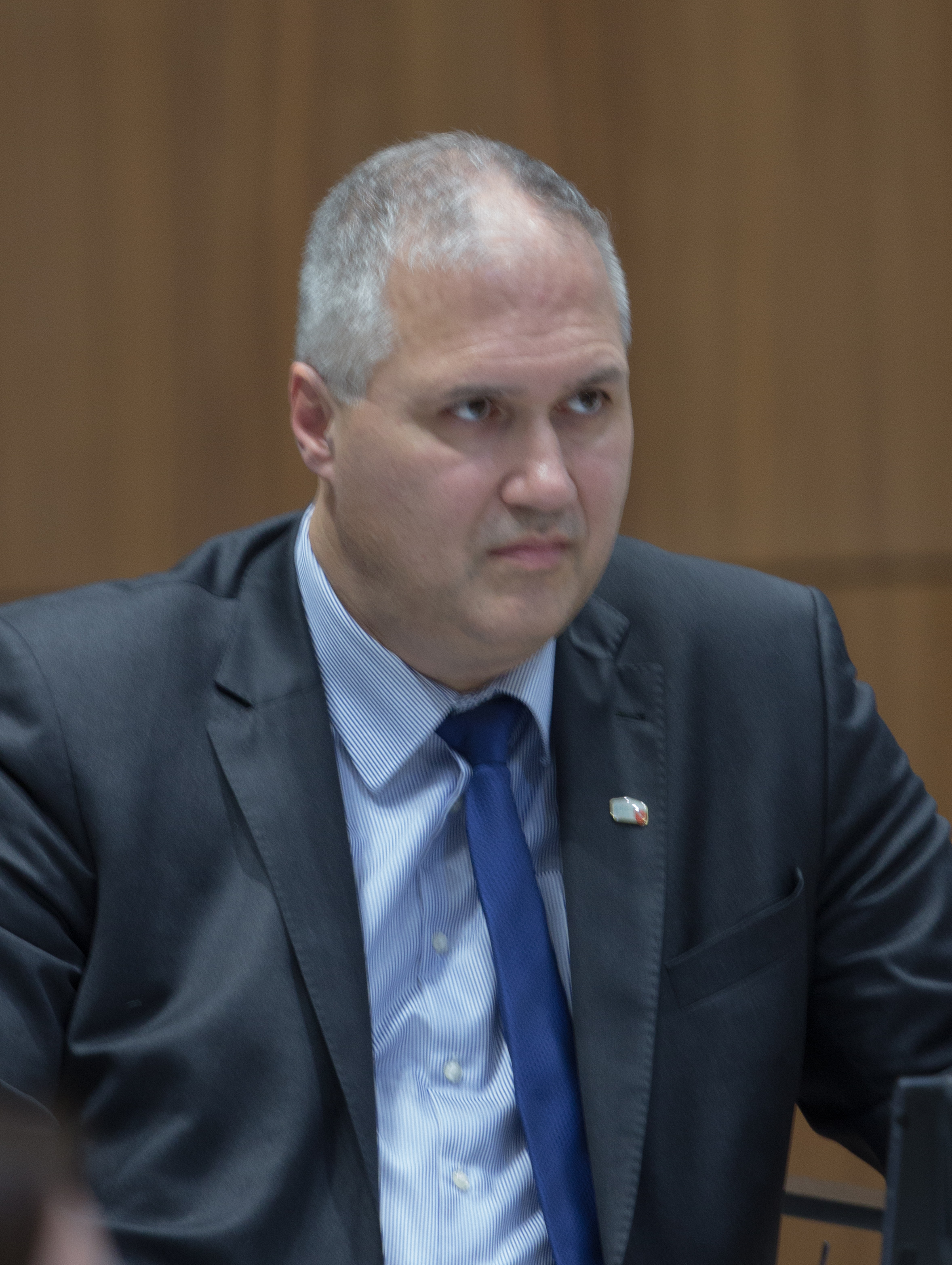 Stefan Henze am 28. Februar 2018 im Plenum des Niedersächsischen Landtages.